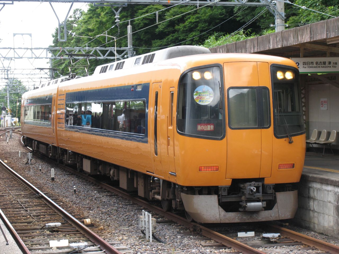 近鉄特急